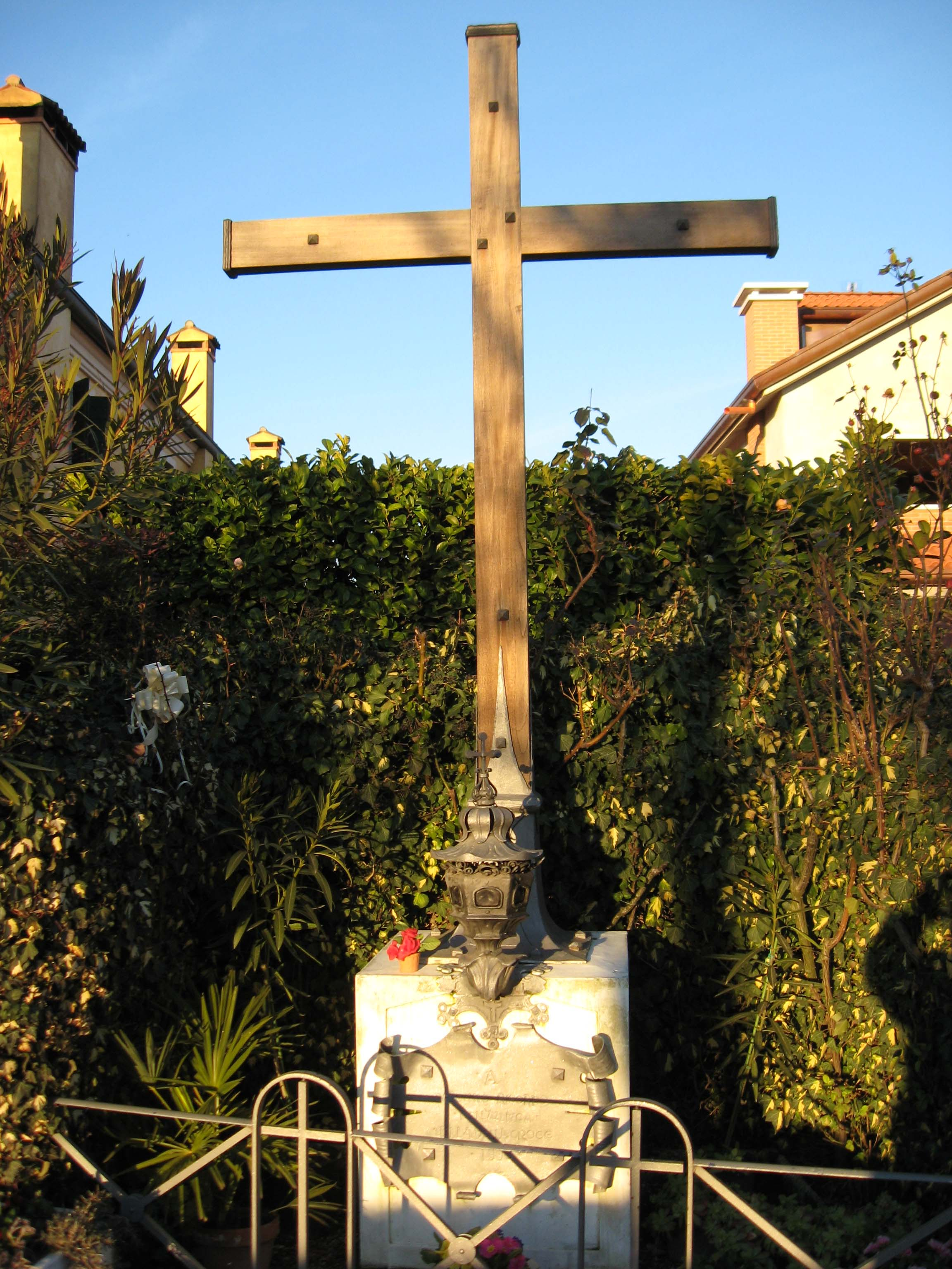 Altichiero